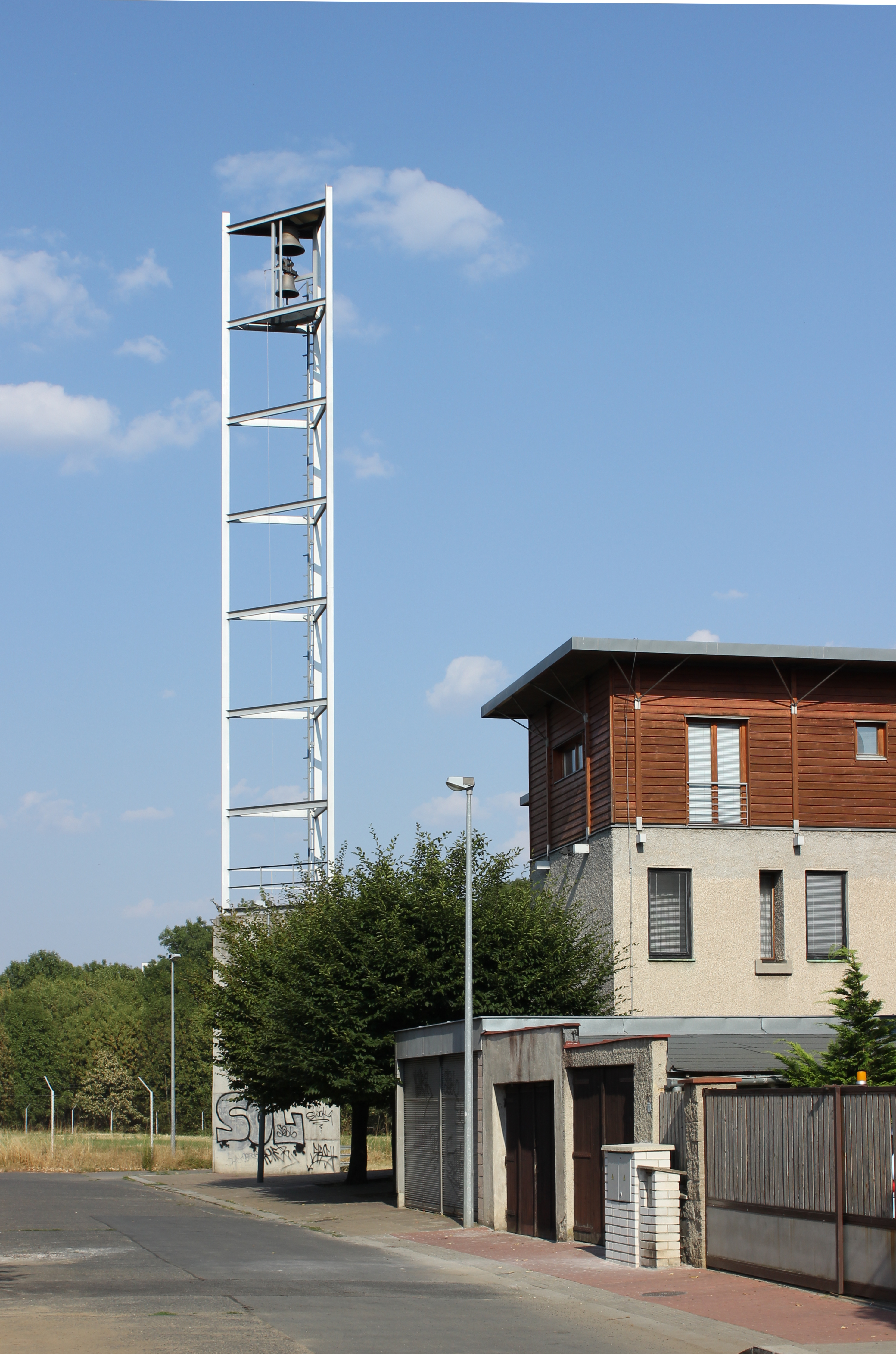 Západní pohled na zvonici kostela U Jákobova žebříku v Praze, Kobylisích.